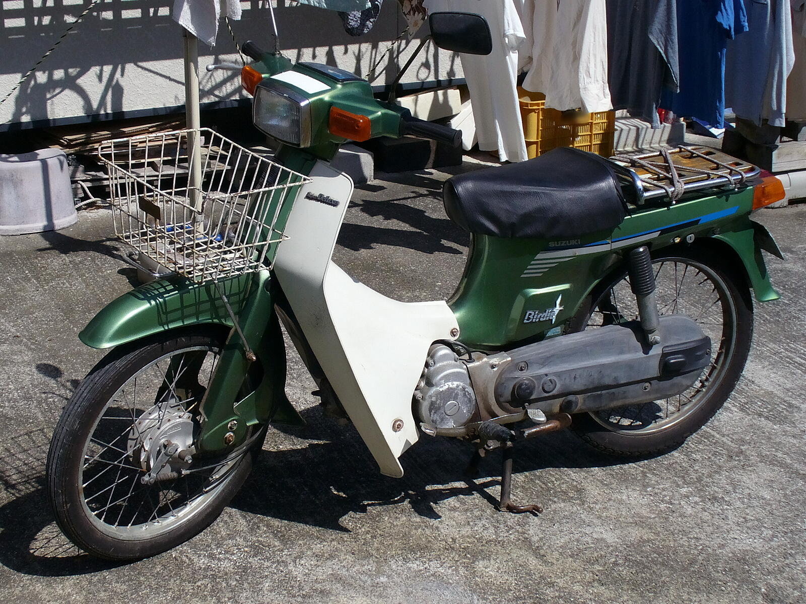 スズキ・バーディー